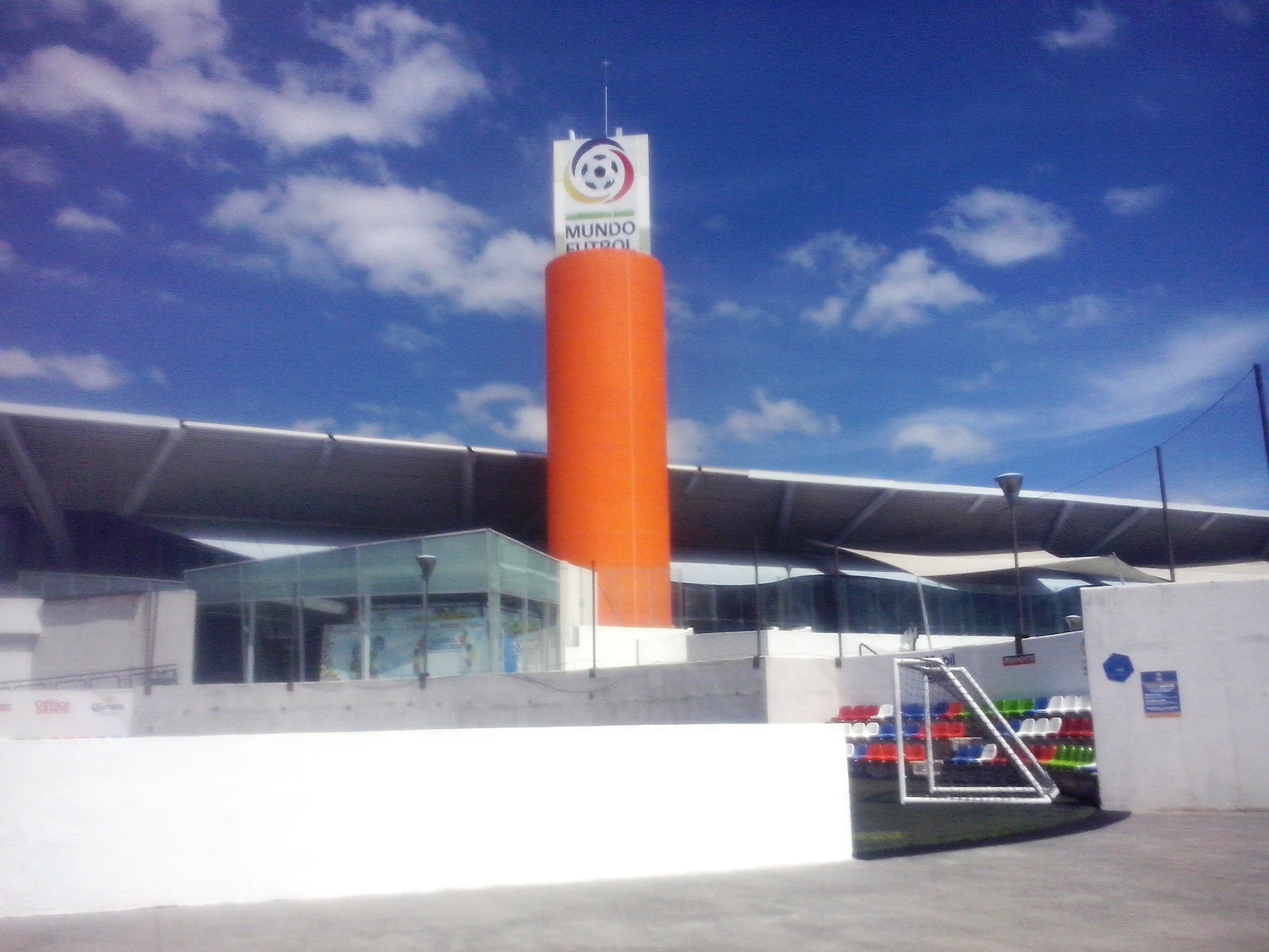 Centro Interactivo Mundo Fútbol en el Parque David Ben Gurión en la ciudad de Pachuca de Soto, México